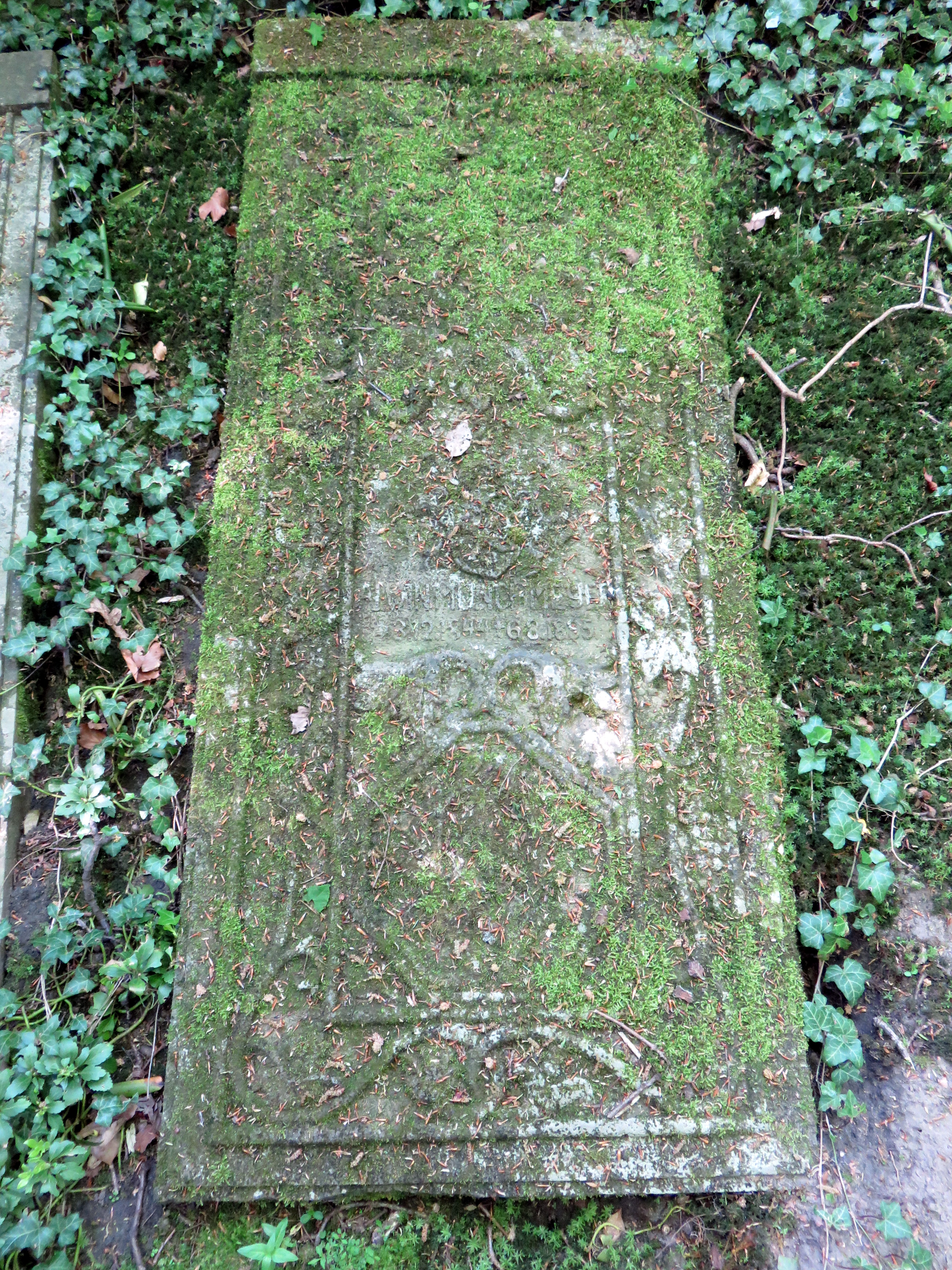 Grabplatte für den deutschen Kaufmann Alwin Münchmeyer, Sohn des Hamburger Kaufmanns Hermann Münchmeyer, im Bereich der rondeelartigen Familiengrabanlage auf dem Ohlsdorfer Friedhof in Hamburg.